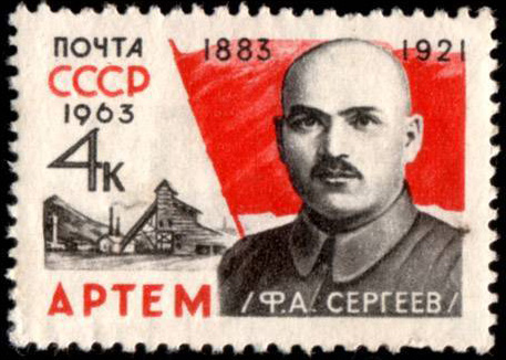 Почтовая марка СССР - Фёдор Андреевич Сергеев (Артём), российский революционер